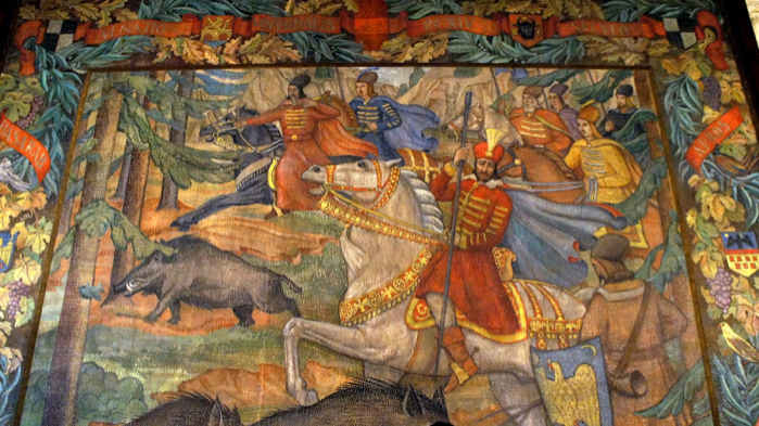 Fresca realizată de D. Știubei pentru gara regală din Sinaia